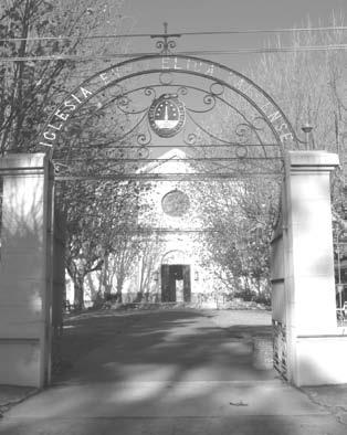 Templo de la Iglesia Evangelica Valdense del Rio de la Plata, en Colonia Valdense.